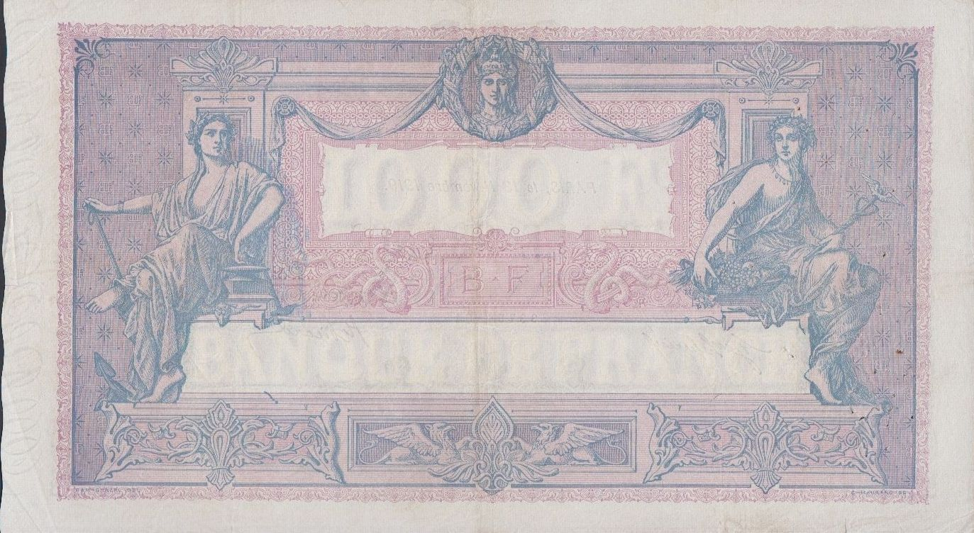 1000 francia frank "bleu et rose" típus, hátoldal.